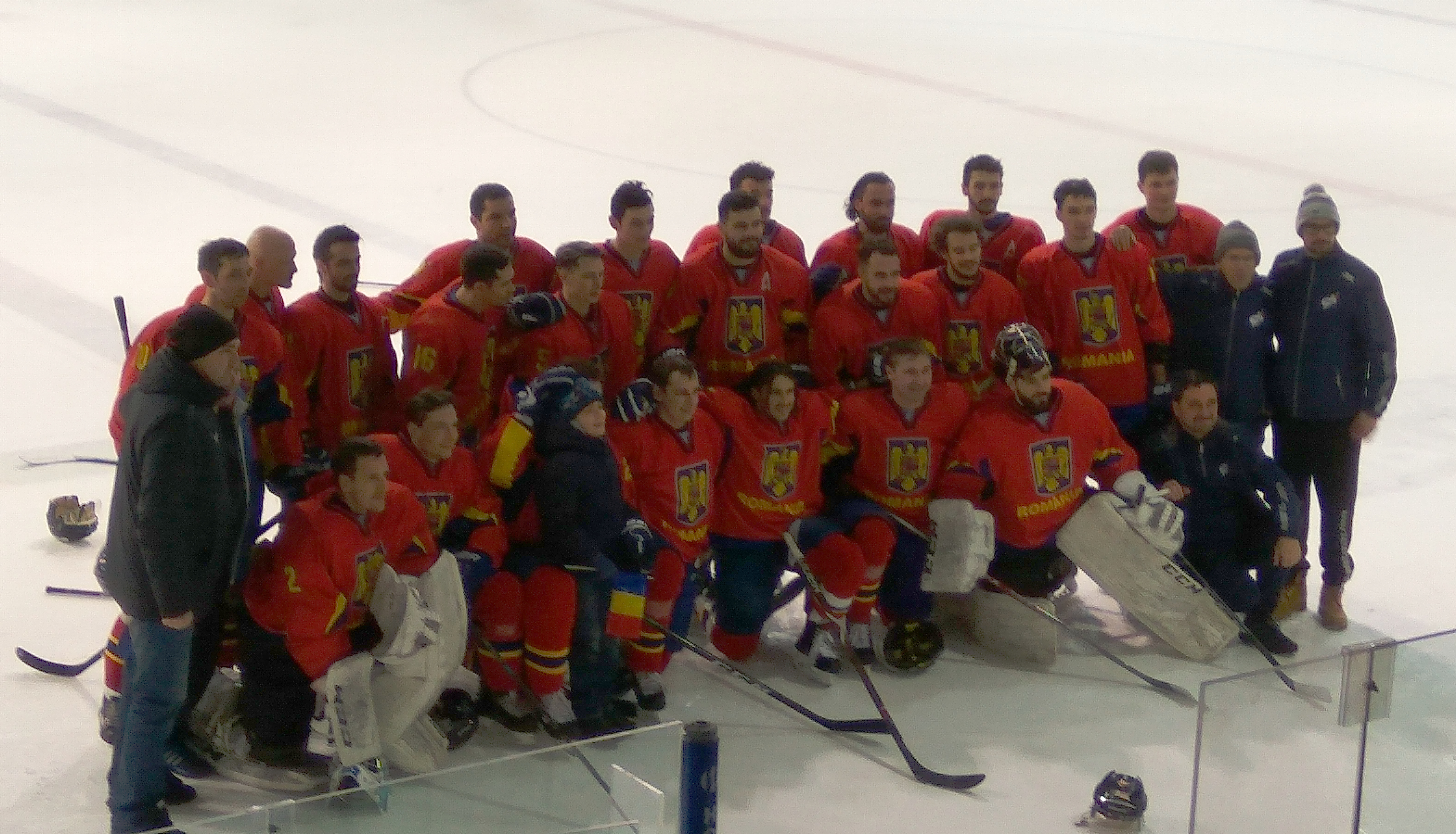 10.02.2019 Україна - Румунія 0:3